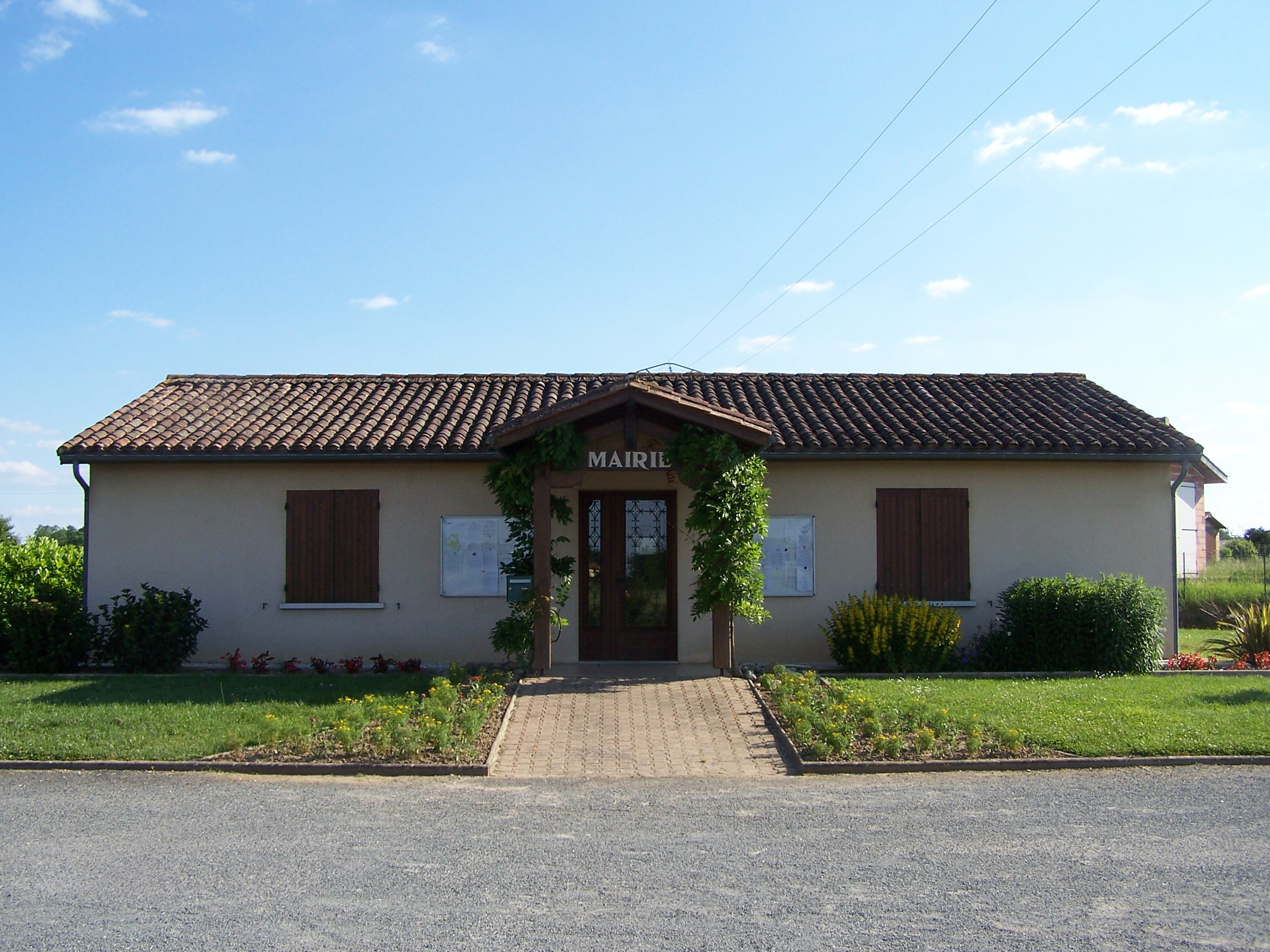 Mairie de Blaignac, Gironde, France